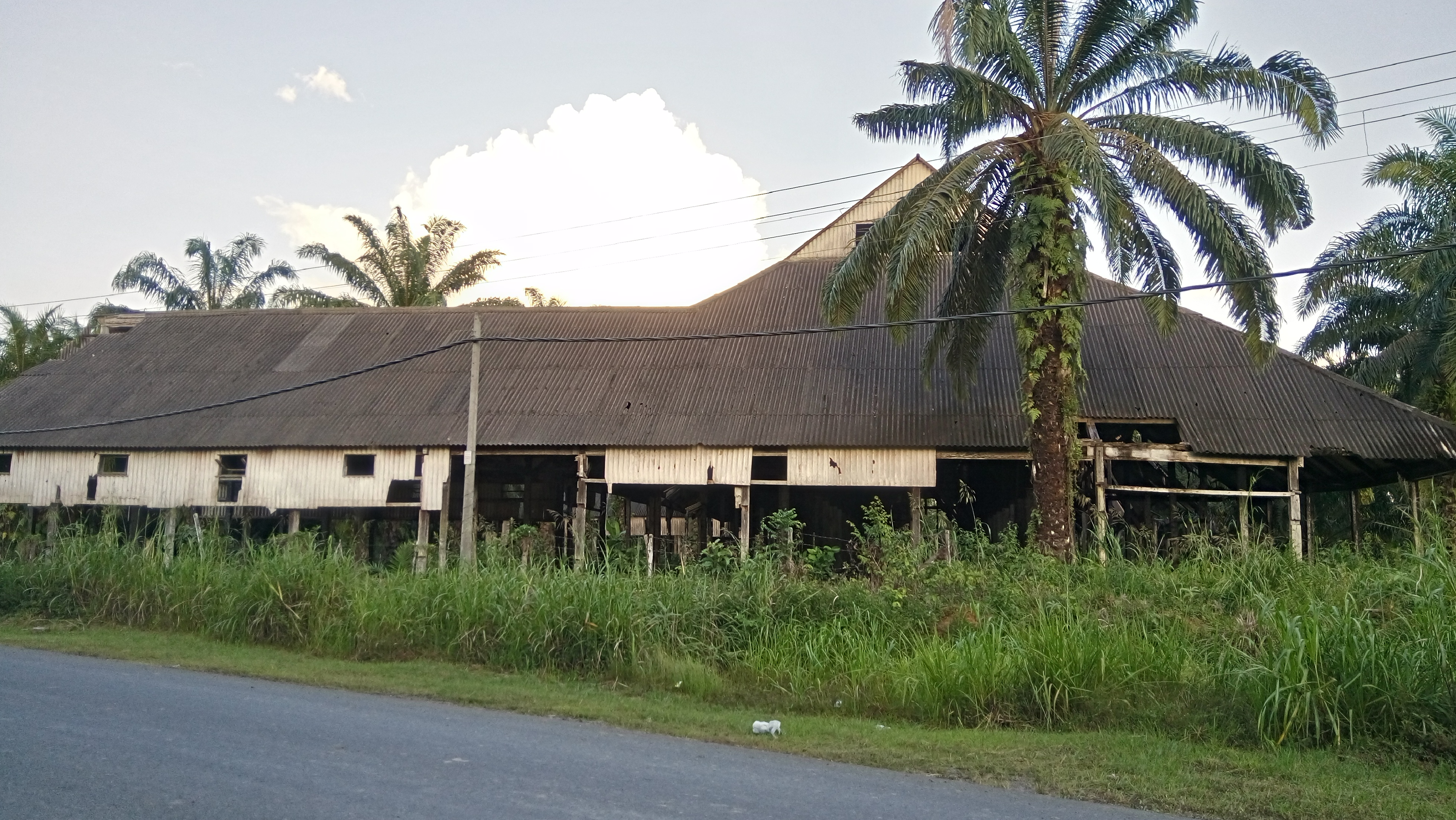 Kawasan bersejarah di Lahad Datu